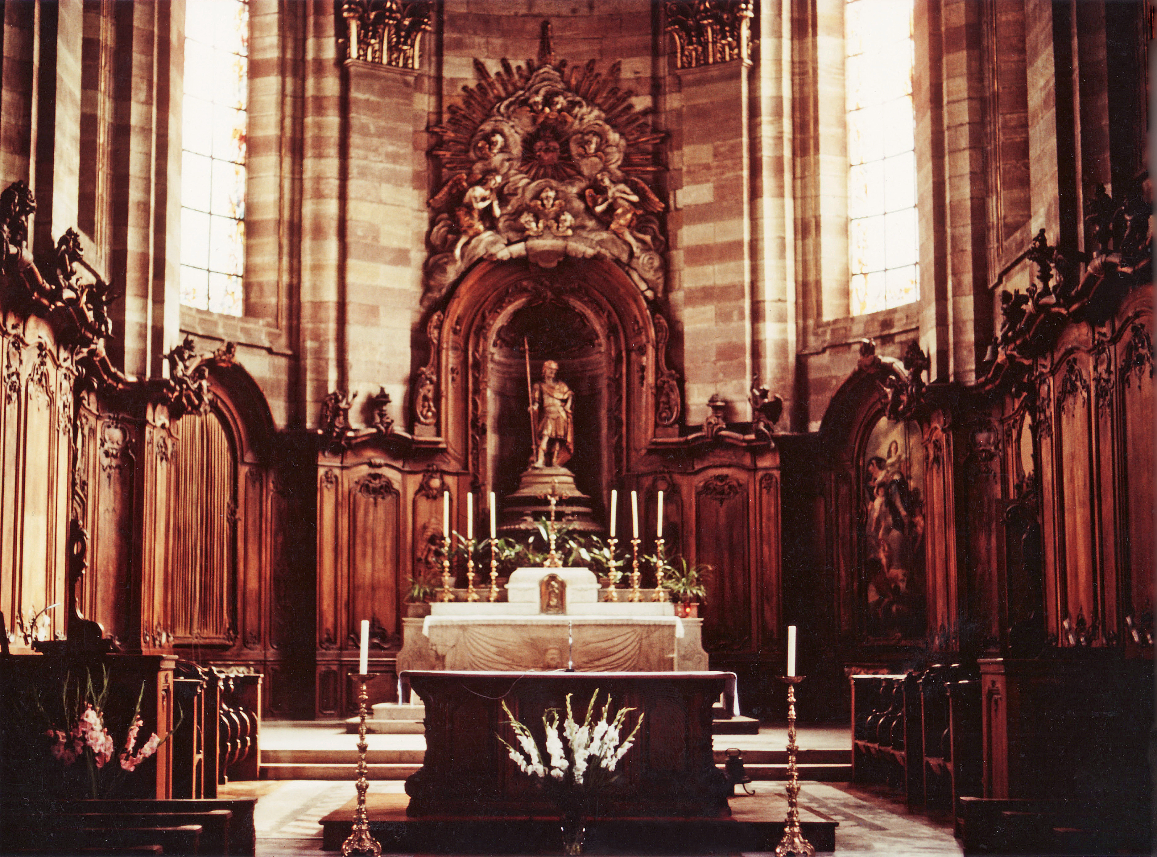 Le choeur de l'abbatiale Saint-Nabor de Saint-Avold en 1981.